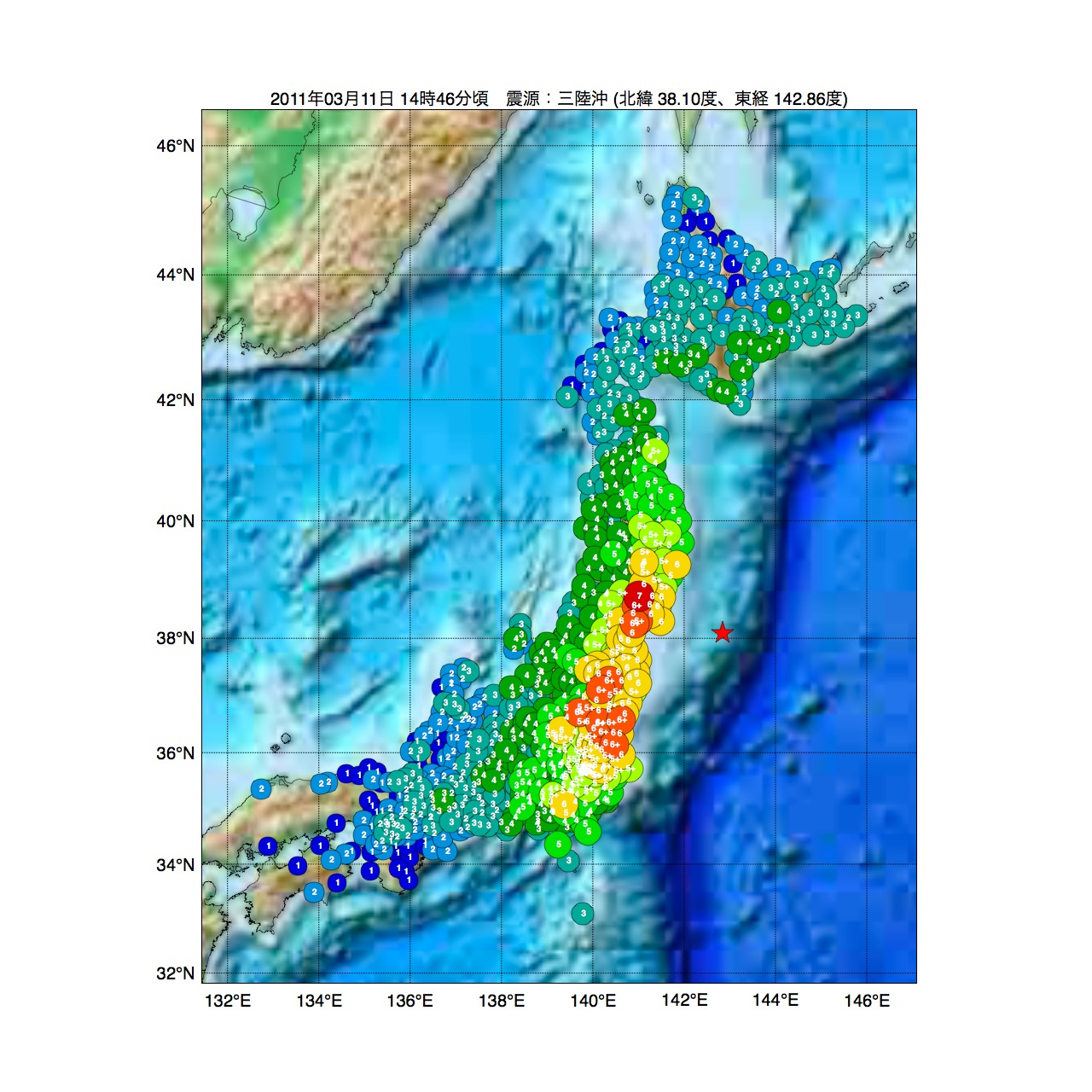 2011年03月11日 14時46分頃 に発生した東日本大震災の震源マップ 震源：北緯 38.10度、東経 142.86度 防災科学技術研究所の地震計のデータより作成。